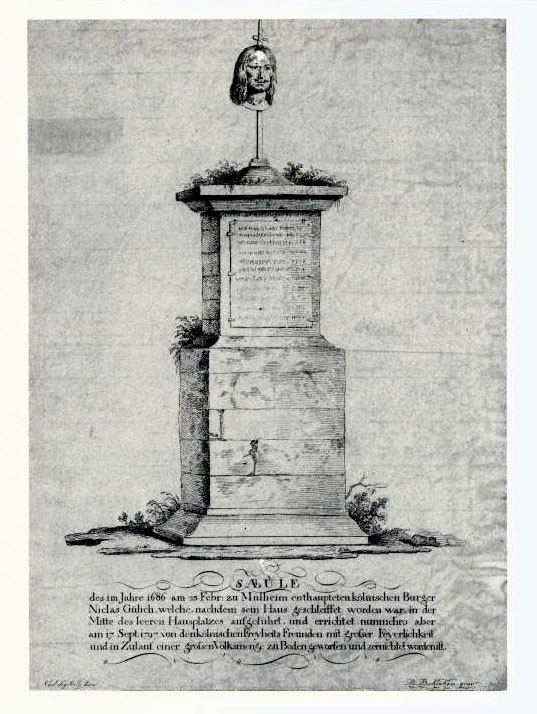 Köln, Darstellung der Gülich-Schandsäule, die von 1686 bis 1797 zur Abschreckung der Bürger auf dem Grundstück Nikolaus Gülichs stand. Sie wurde wie die noch in der Stadt vorhandenen Pranger von den Franzosen abgebrochen.